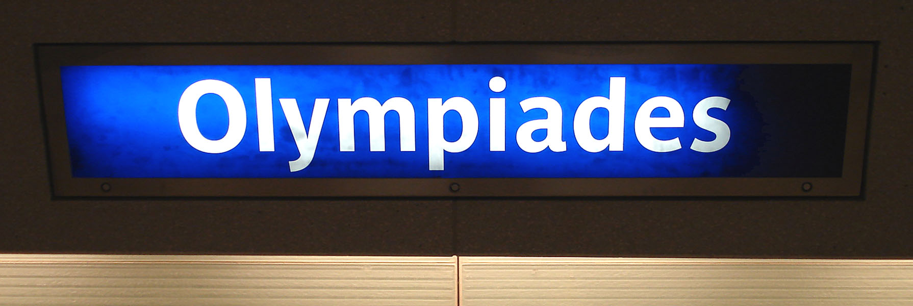 La station Olympiades de la ligne 14 du métro de Paris, France